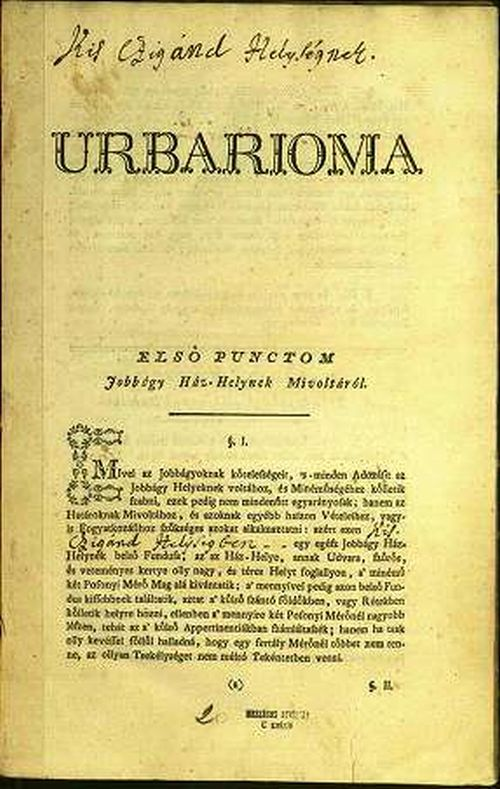 Kiscigánd Mária Terézia által 1767-ben elrendelt úrbérrendezés során készített urbáriumának címlapja